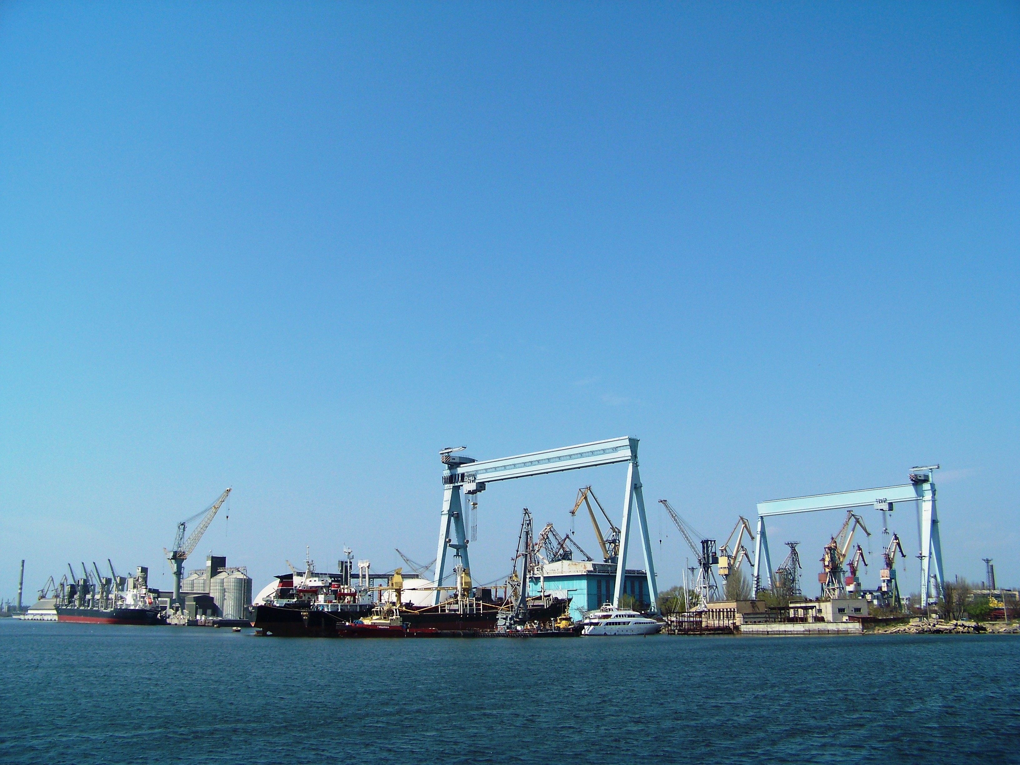 Николаевский Черноморский завод